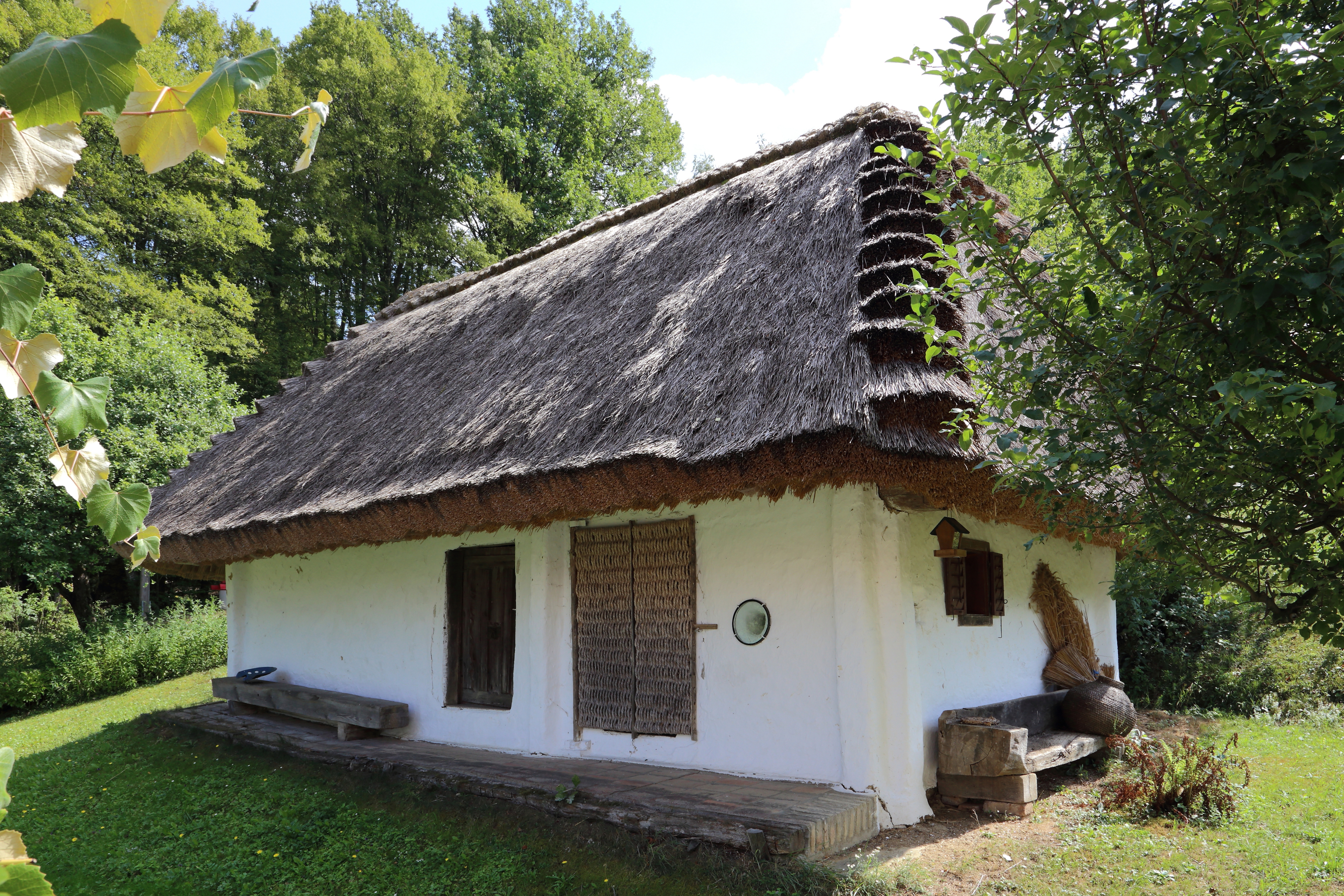 Wein- bzw. Blockkeller in Reinersdorf (Nr.94), einem Ortsteil der burgenländischen Gemeinde Heiligenbrunn. Holzblockbau mit lehmverschmierten, weißgekalkten Wänden und Walmdach mit Strohdeckung sowie einer strohgeflochtenen Schutztür.